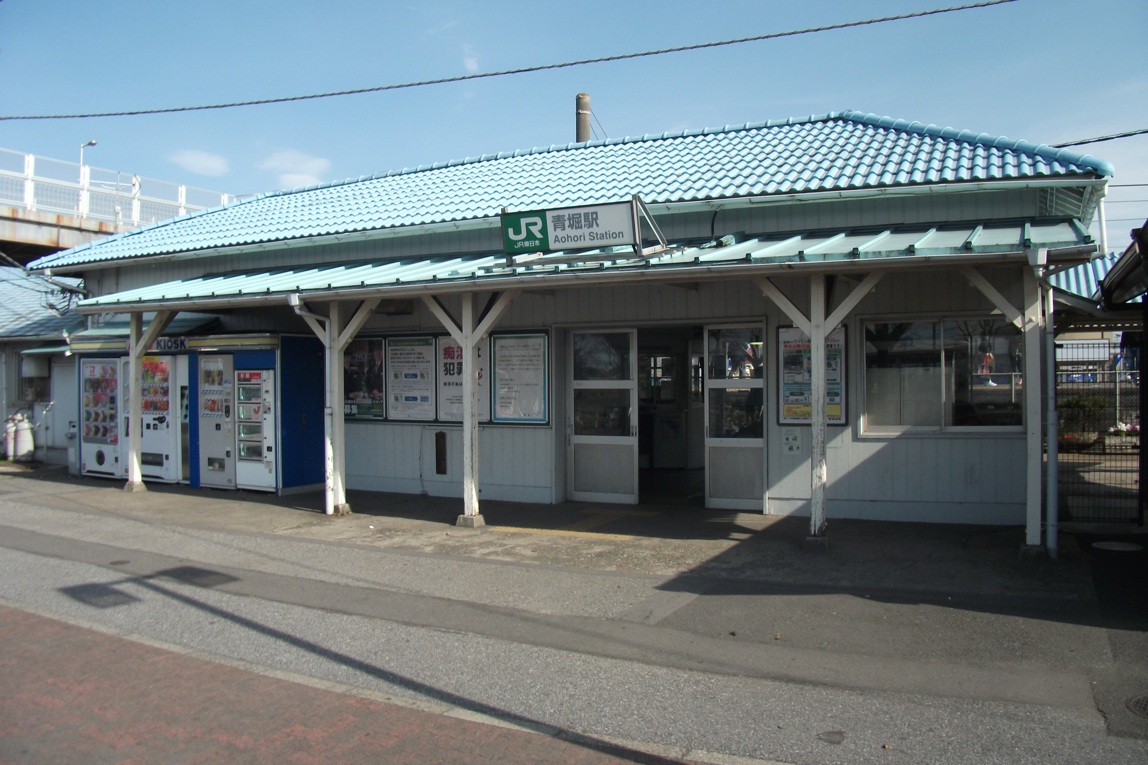 JR内房線 青堀駅駅舎